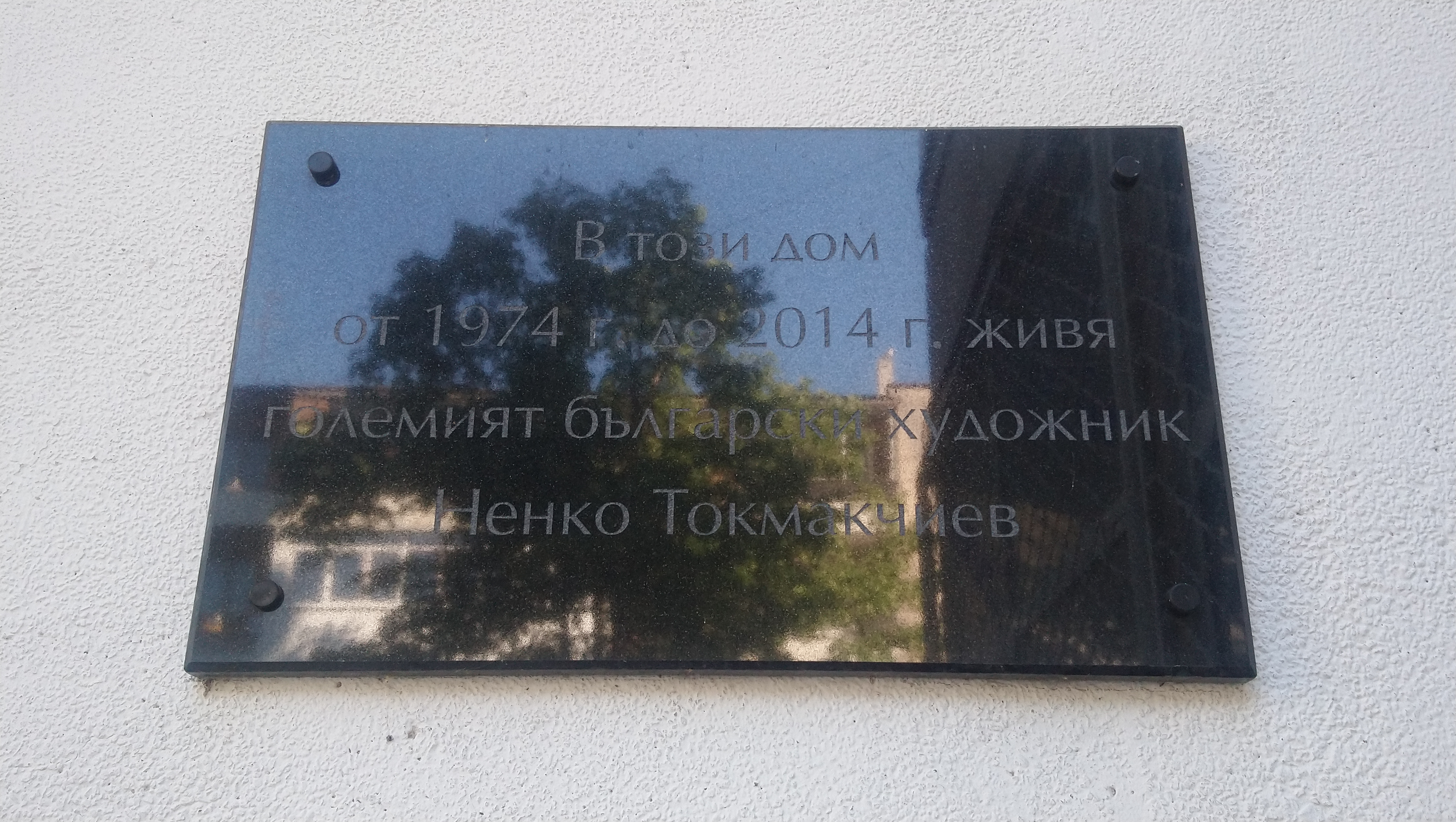 Паметна плоча на художника Ненко Токмакчиев, ул. Оборище 109, Бургас